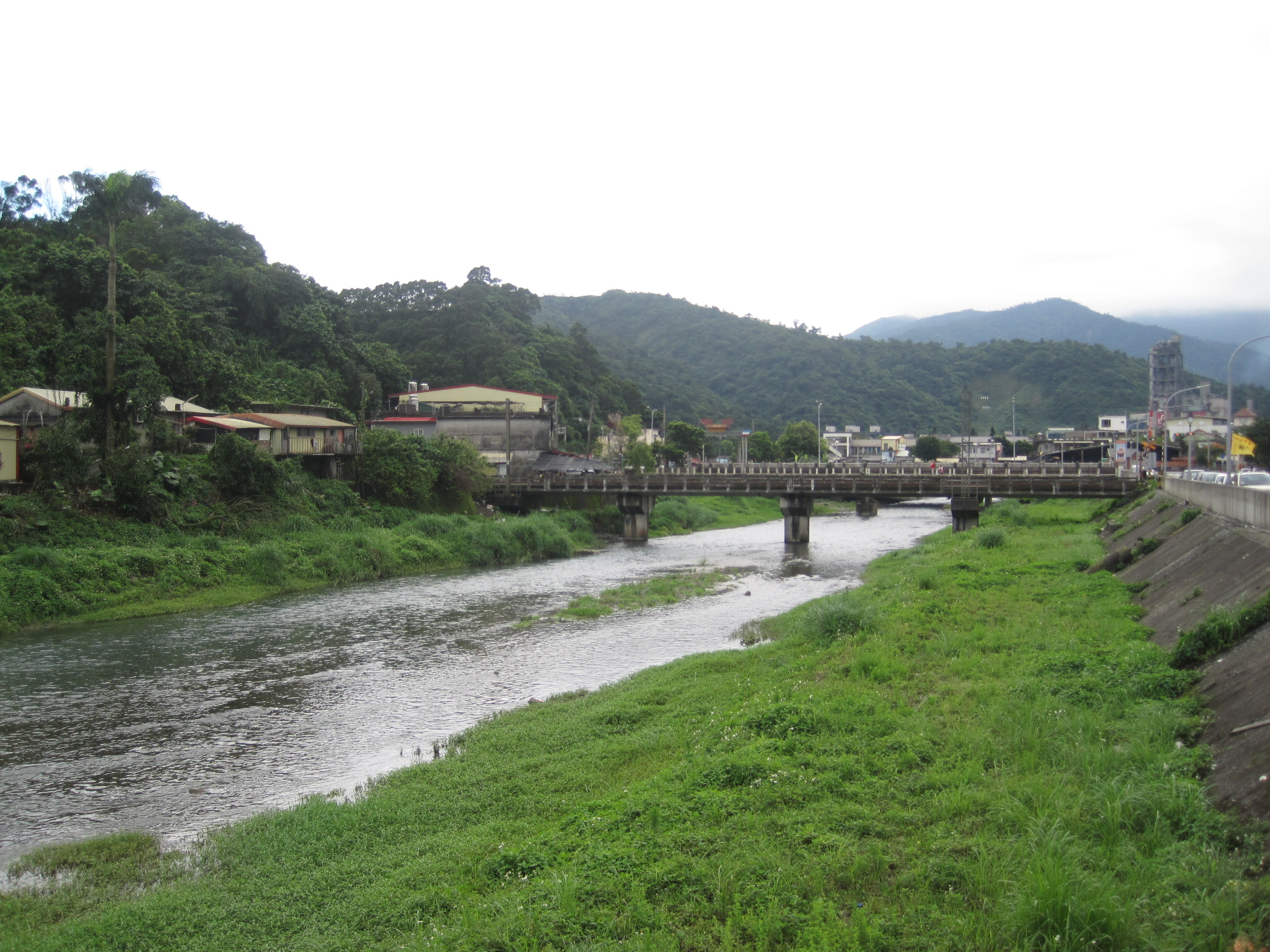 蘇澳溪，圖中的橋為通往蘇澳臨港線的鐵道橋。